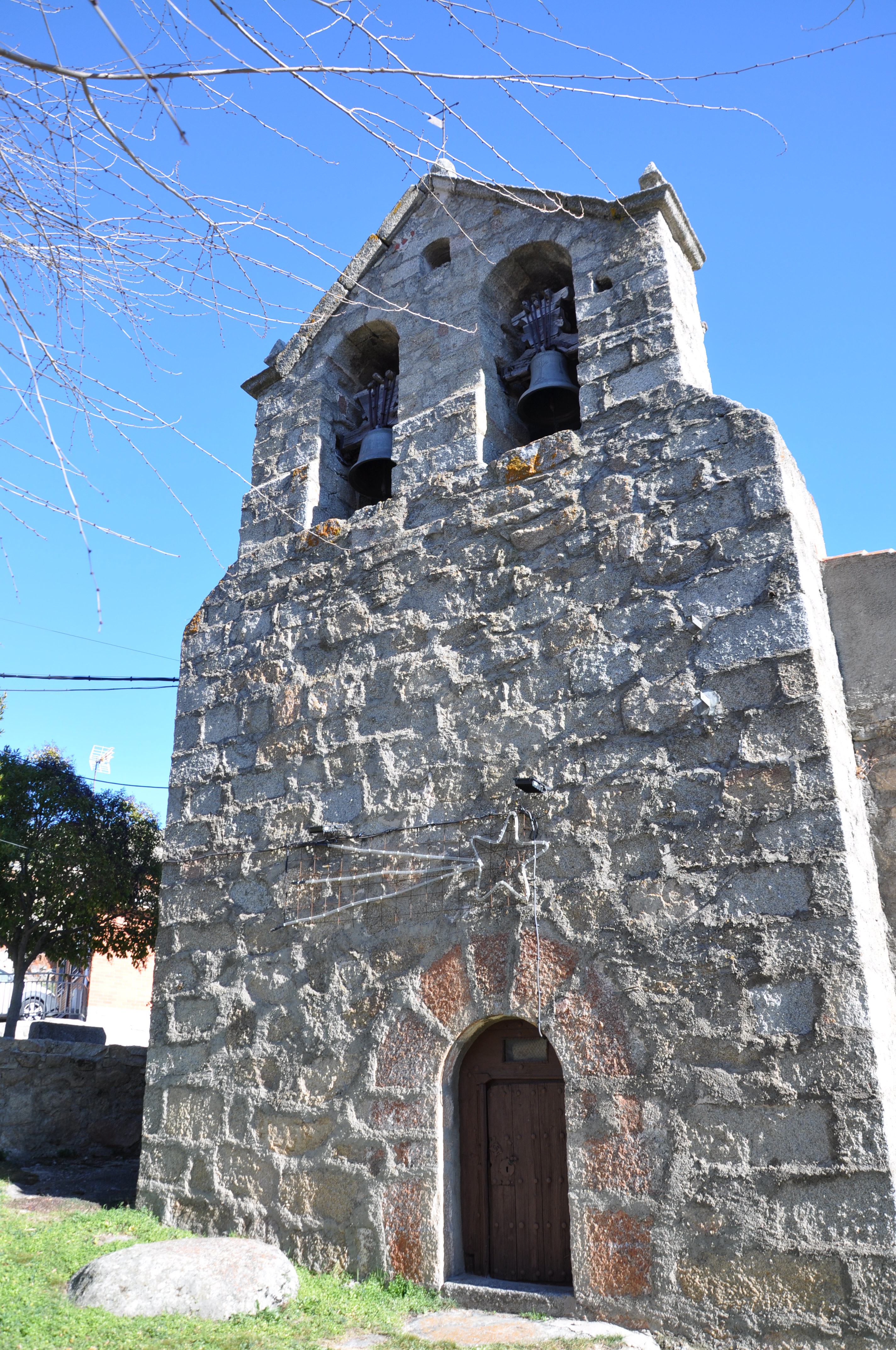 Iglesia parroquial de San Miguel Arcángel , Navatalgordo, Ávila, España